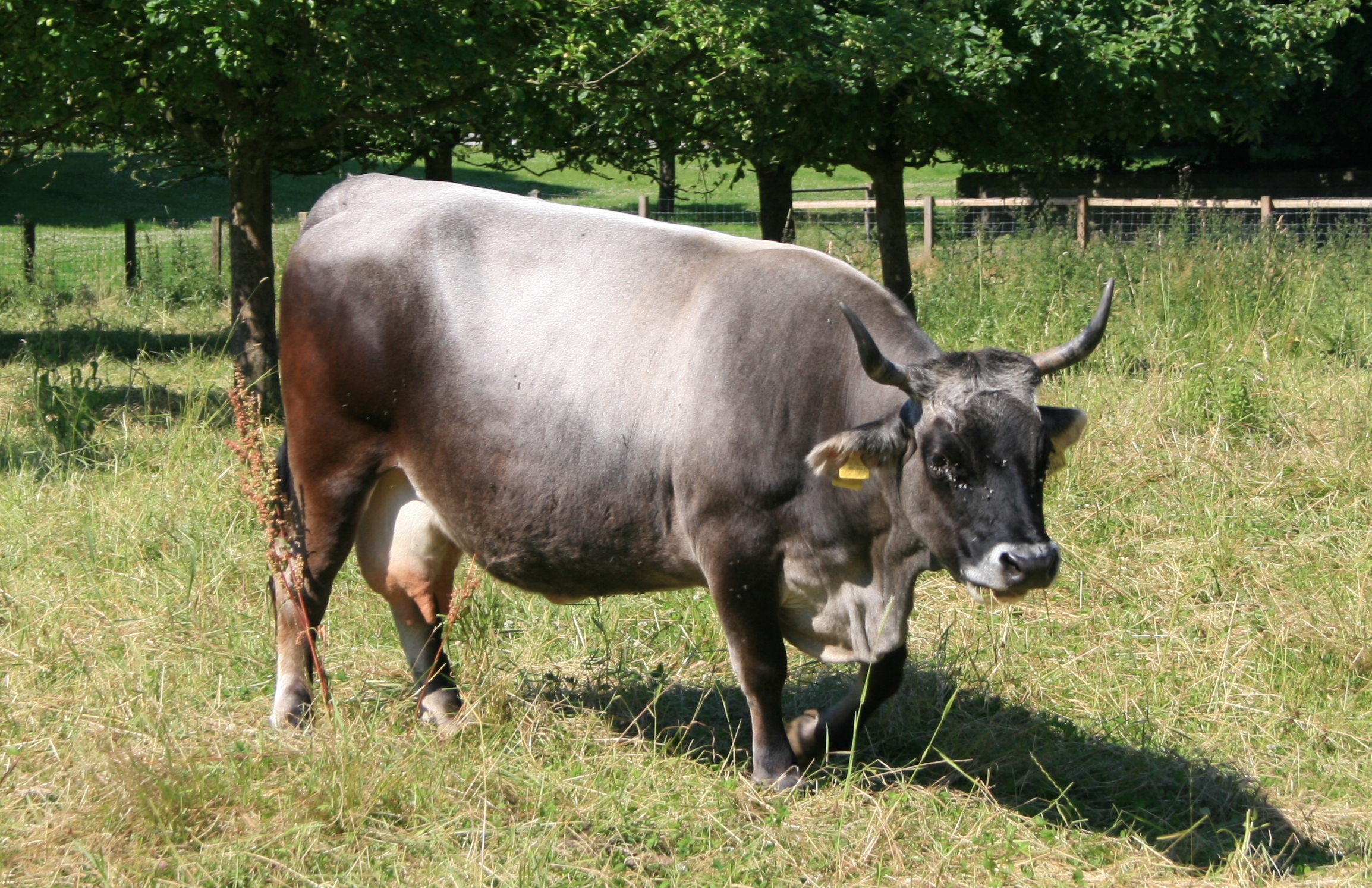 Rätisches Grauvieh in Königsfelden, Windisch, Schweiz